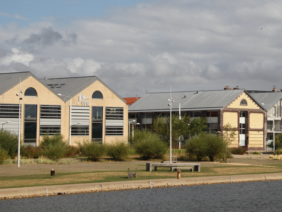 Logement AIVP